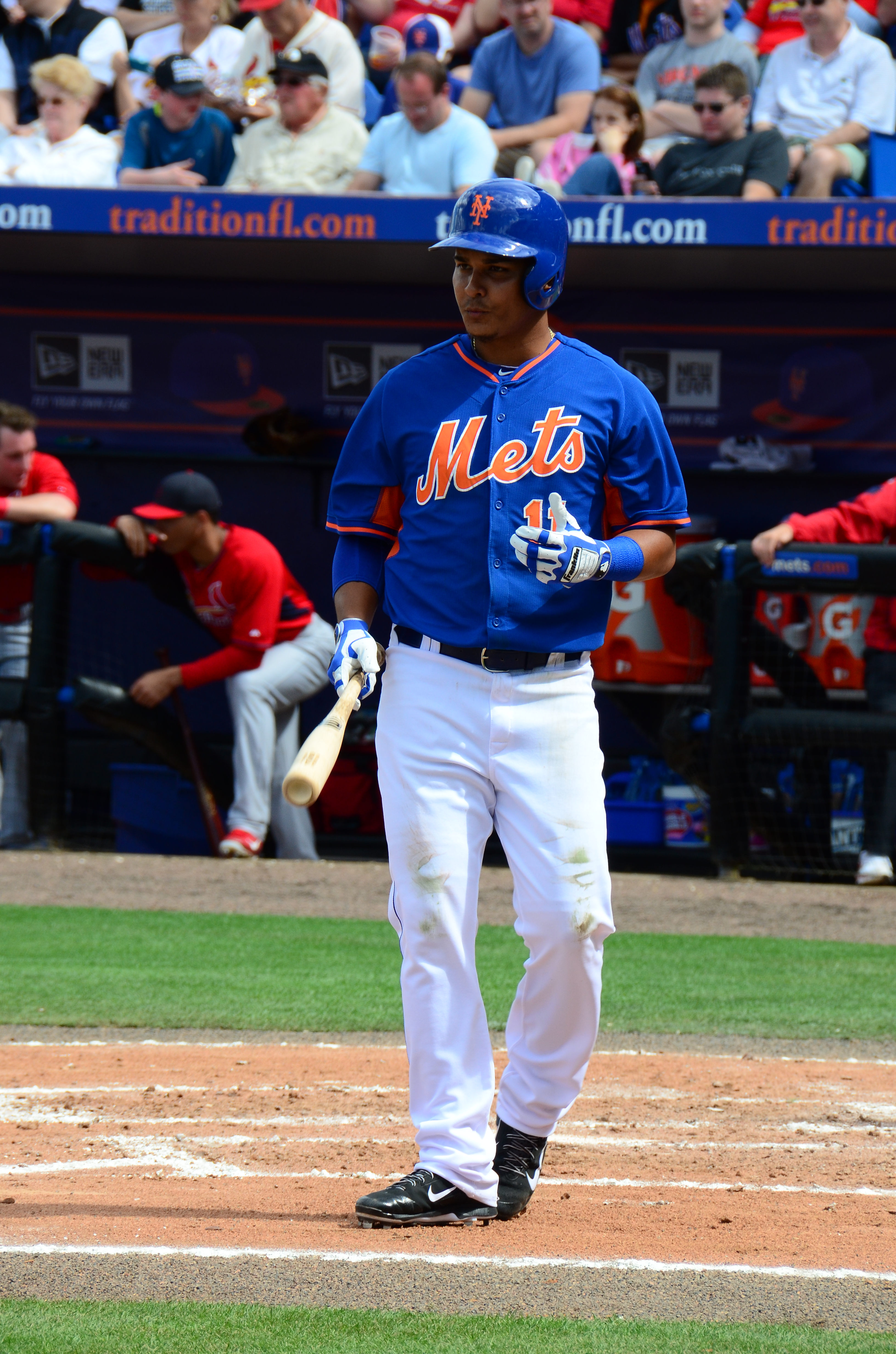 Ruben Tejada, NY Mets, Spring Training, March 7, 2014